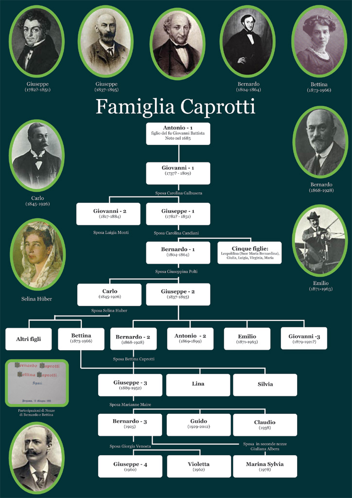 Albero genealogico della famiglia Caprotti